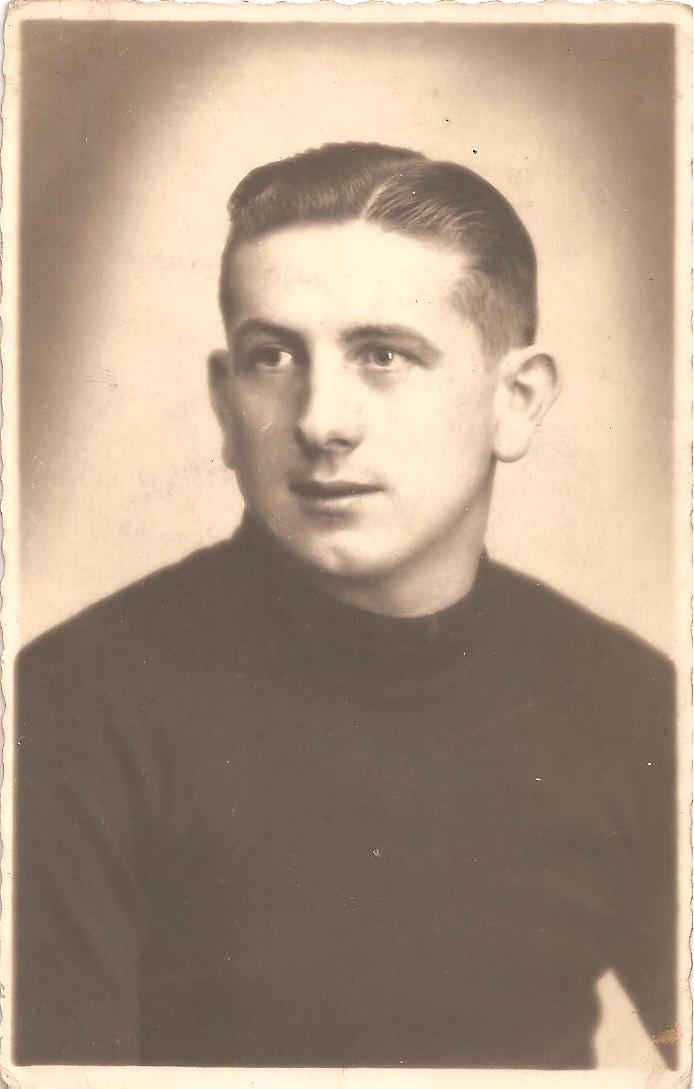 Retour Châteauroux